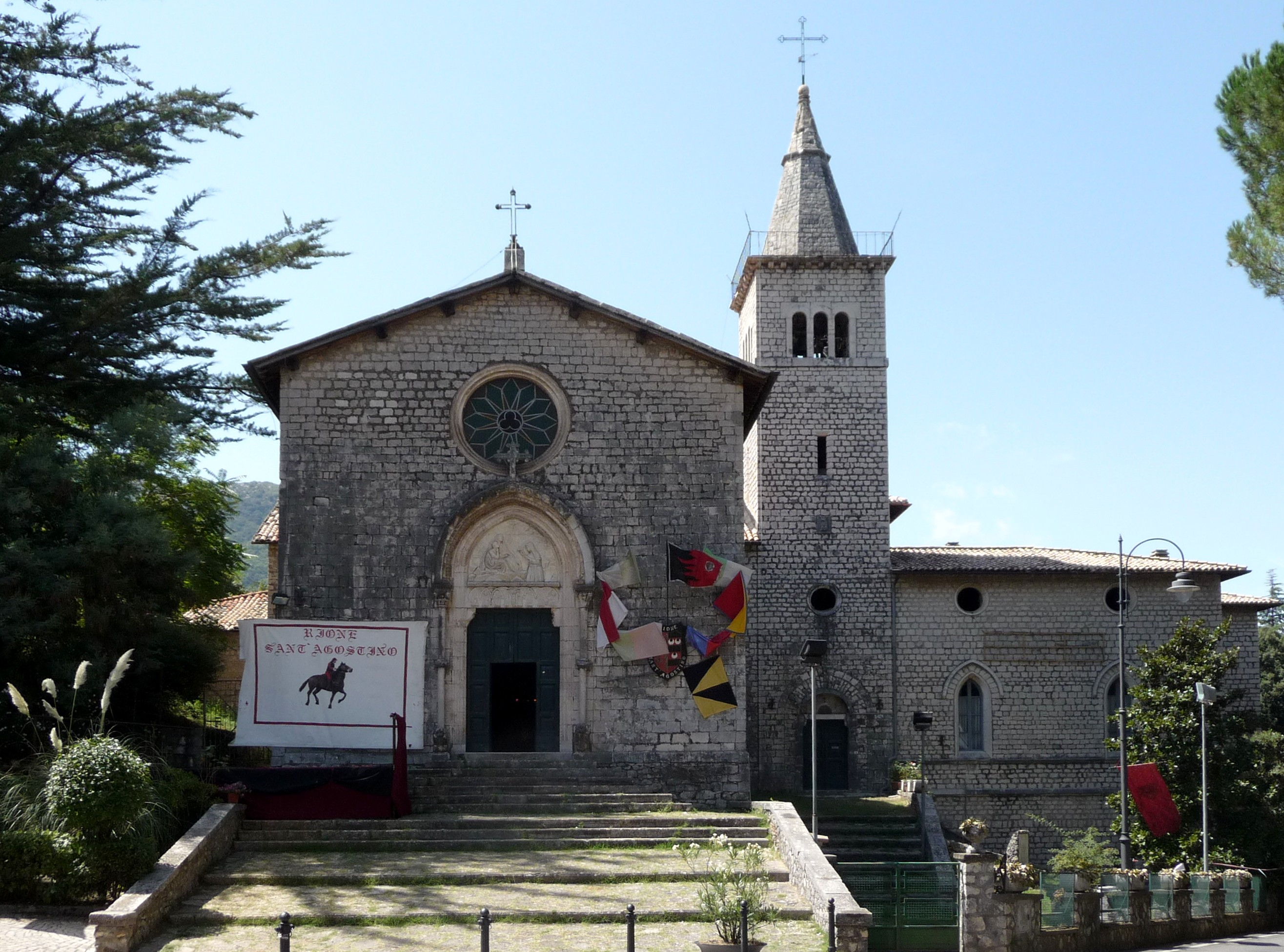 Chiesa di Sant'Agostino